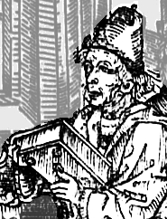 Modificación de una imagen de Juan de Mena ofrenciendo a Juan II su Laberinto de Fortuna, de la portada de una edición impresa en Zaragoza, por Jorge Coci, 1515